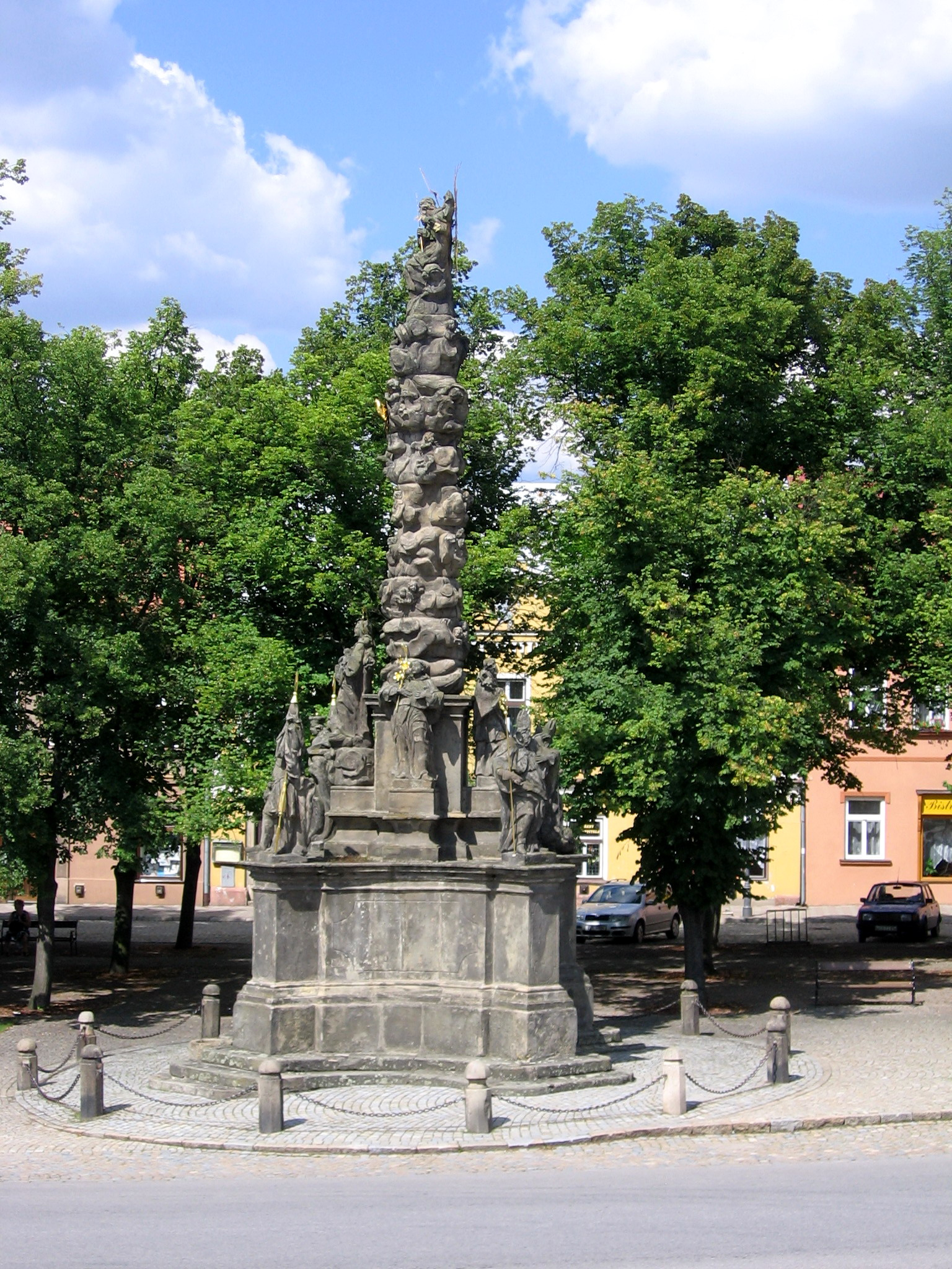 Polná, barokní sousoší Nejsvětější Trojice – morový sloup z dílny V. V. Morávka, pochází z roku 1750